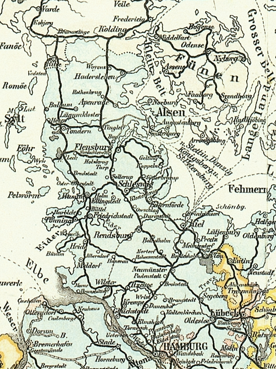 Ausschnitt Bahnen in Schleswigholstein aus der Bahnkarte_Deutschland_1899